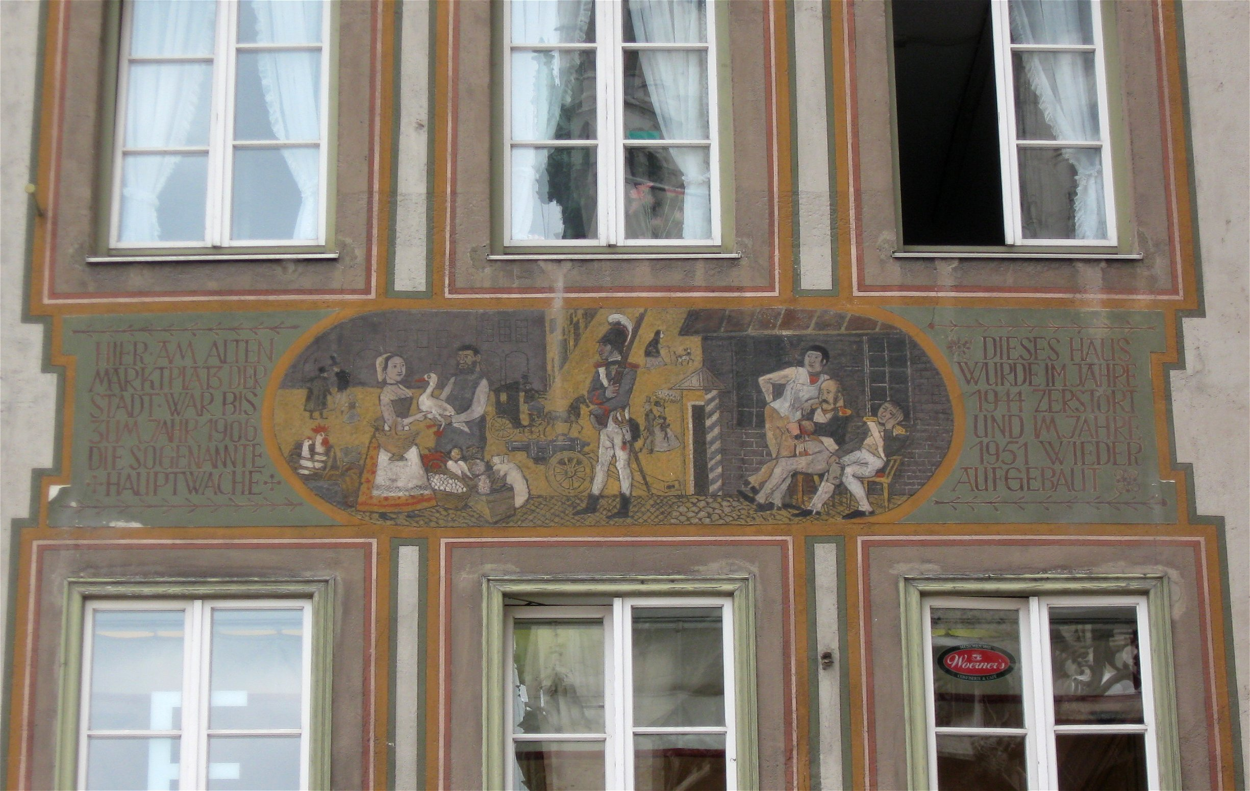 Marienplatz 2; Wohn- und Geschäftshaus, sechsgeschossiger Putzbau mit Fassadenmalerei, seit 1865 zu Nr. 1 gehörig, um zwei Geschosse aufgestockt, 1870, beim Wiederaufbau neugestaltet, 1951.